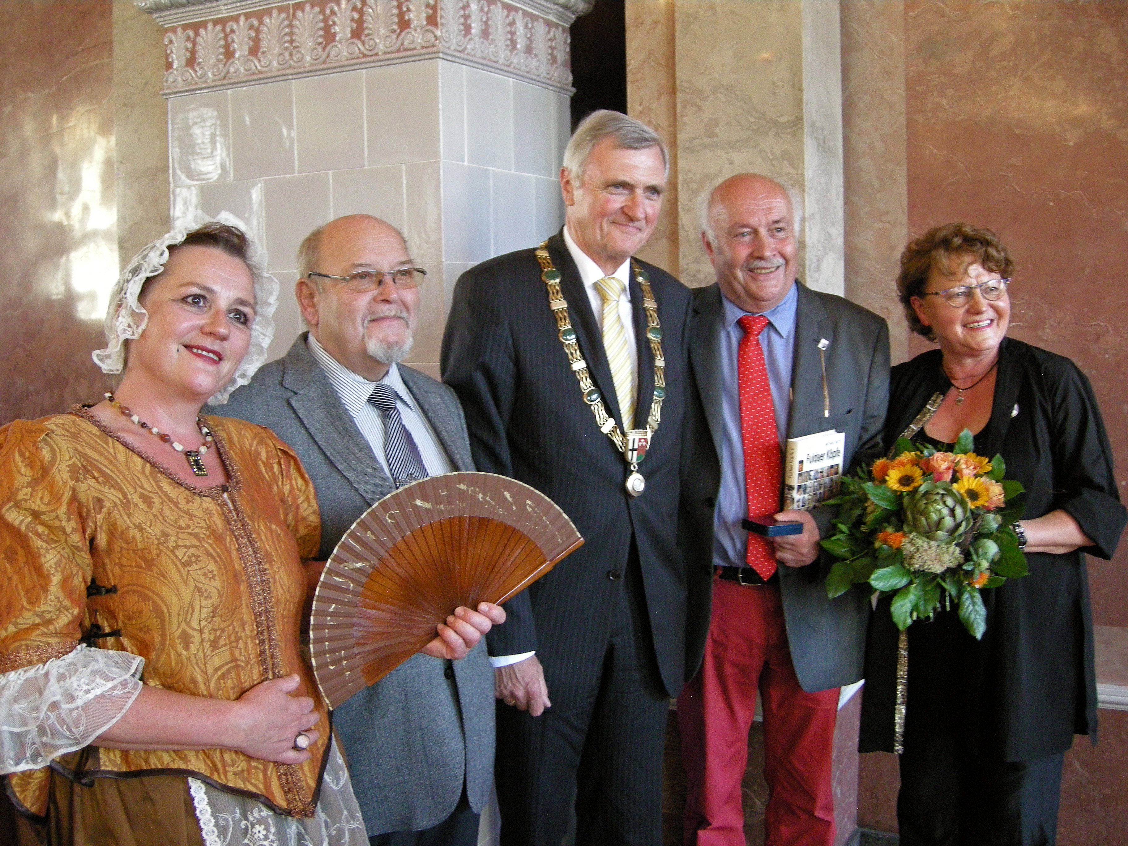 Der Heimatkundler, Denkmalpfleger, Journalist und Autor Michael Mott hat am 5. September 2013 für seine vielfältigen heimatgeschichtlichen Aktivitäten, die zum Ansehen der Stadt Fulda und zur Wahrung des historischen Stadtbildes beigetragen haben, im vollbesetzten Marmorsaal der alten Fuldaer Residenz, vom Fuldaer Magistrat die Ferdinand-Braun-Medaille erhalten. Auf dem Foto: "Schokoladenmädchen" Franziska von Merlau (Nadja Witzel), das Fuldaer "Urgestein" Multitalent Günther Elm, Oberbürgermeister und Laudator Gerhard Möller, Michael Mott und Ehefrau Hella Mott.